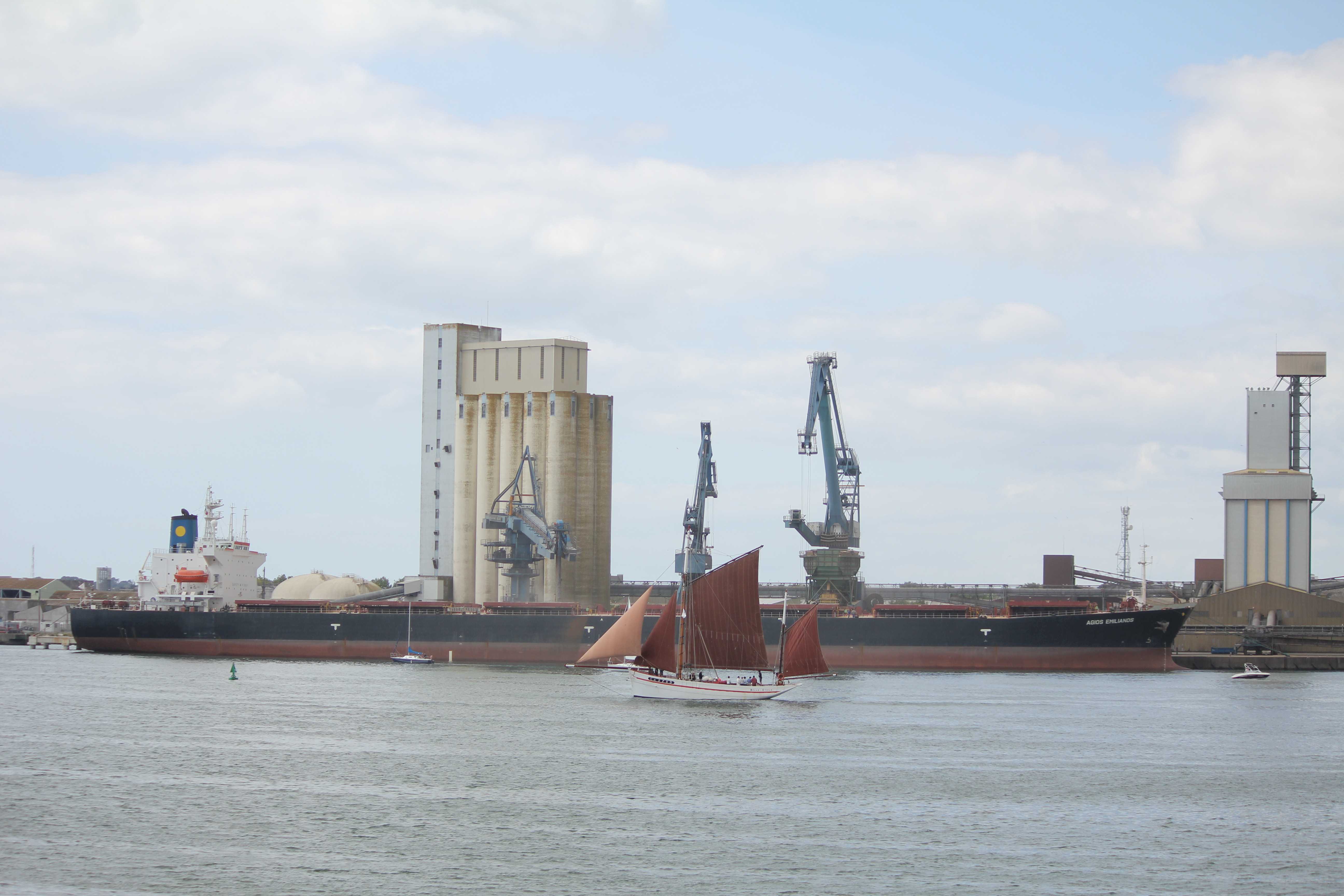 Belle Étoile (bateau breton) au port de Kergroise pendant le festival interceltique de Lorient 2011, devant le Agios Emilianos